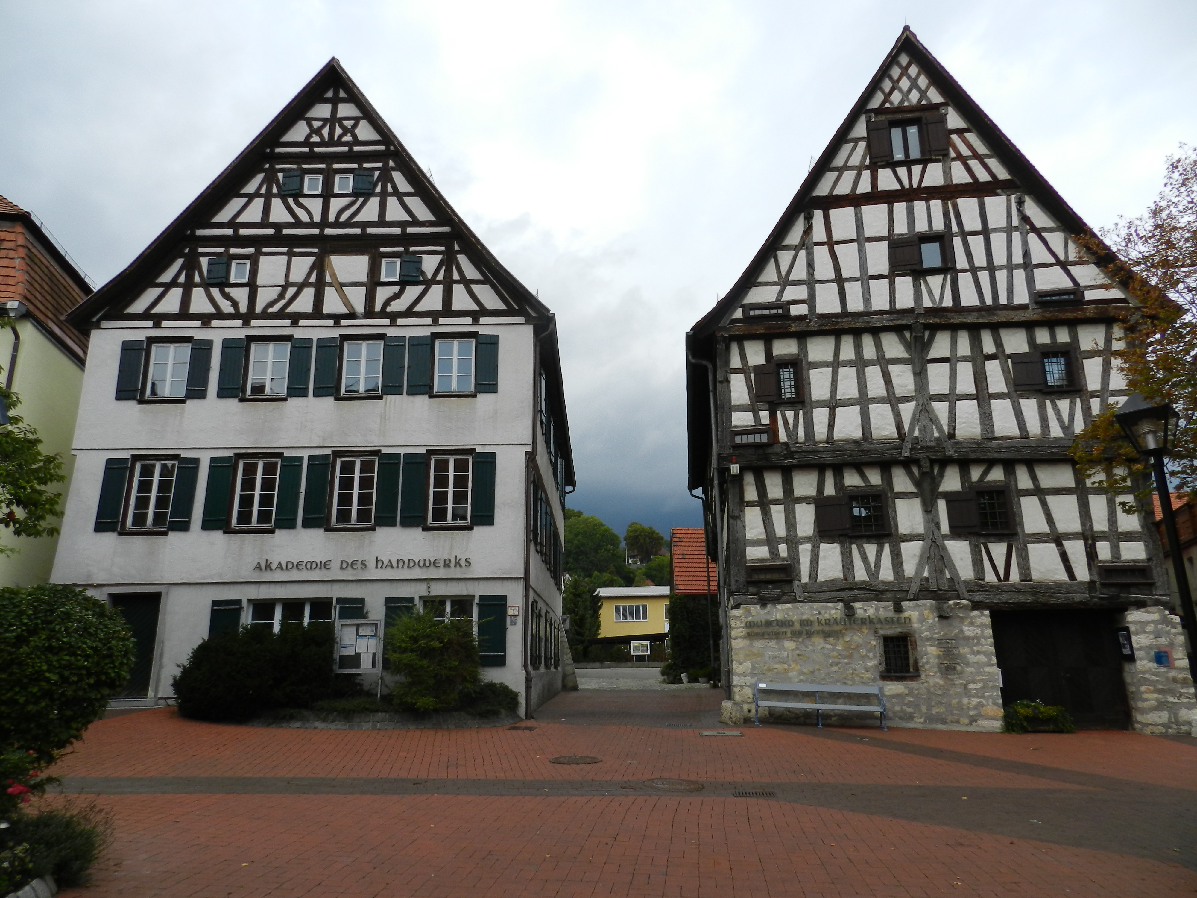 Albstadt-Ebingen, Baden Württemberg,Ehemaliger Martinsfruchtkasten (links), Zehntscheuer für den Dinkel der Martinspflege aus dem Jahre 1584 und Herrschaftlicher Fruchtkasten (rechts), ehemliger Kornspeicher der württembergischen Obrigkeit aus der 2. Hälfte des 15. Jahrhunderts (2011)